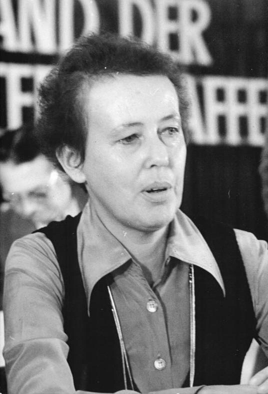 ADN-ZB Eicke 2.12.75 Berlin: Prof. Ruth Berghaus, Theaterregisseur Intendantin des Berliner Ensembles, bis 14.4.1977